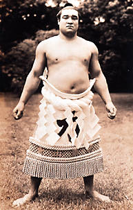 第36代横綱 羽黒山政司